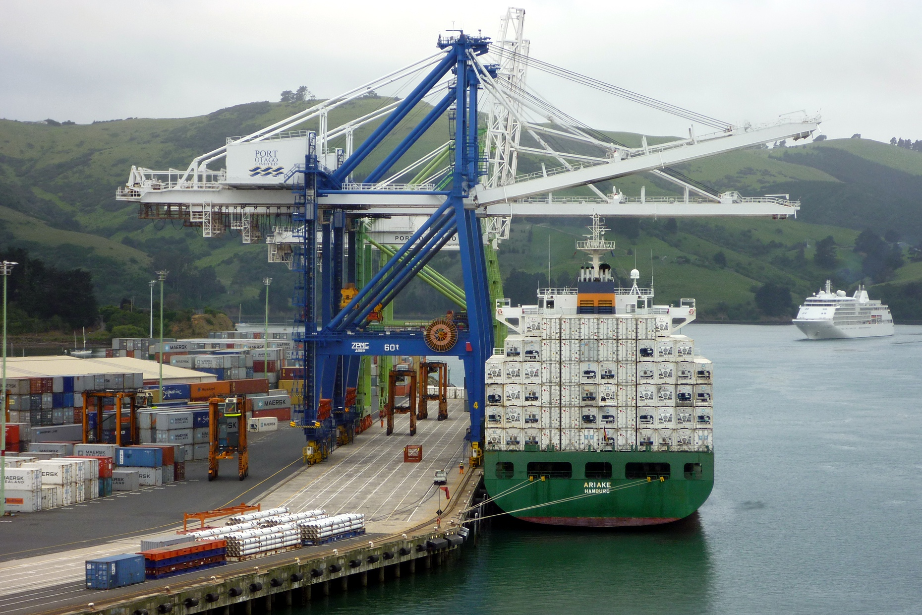 Port Otago, der Hafen von Port Chalmers in Neuseeland, Seehafen von Dunedin